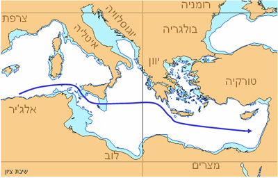 אוניית המעפילים שיבת ציון - מסלול